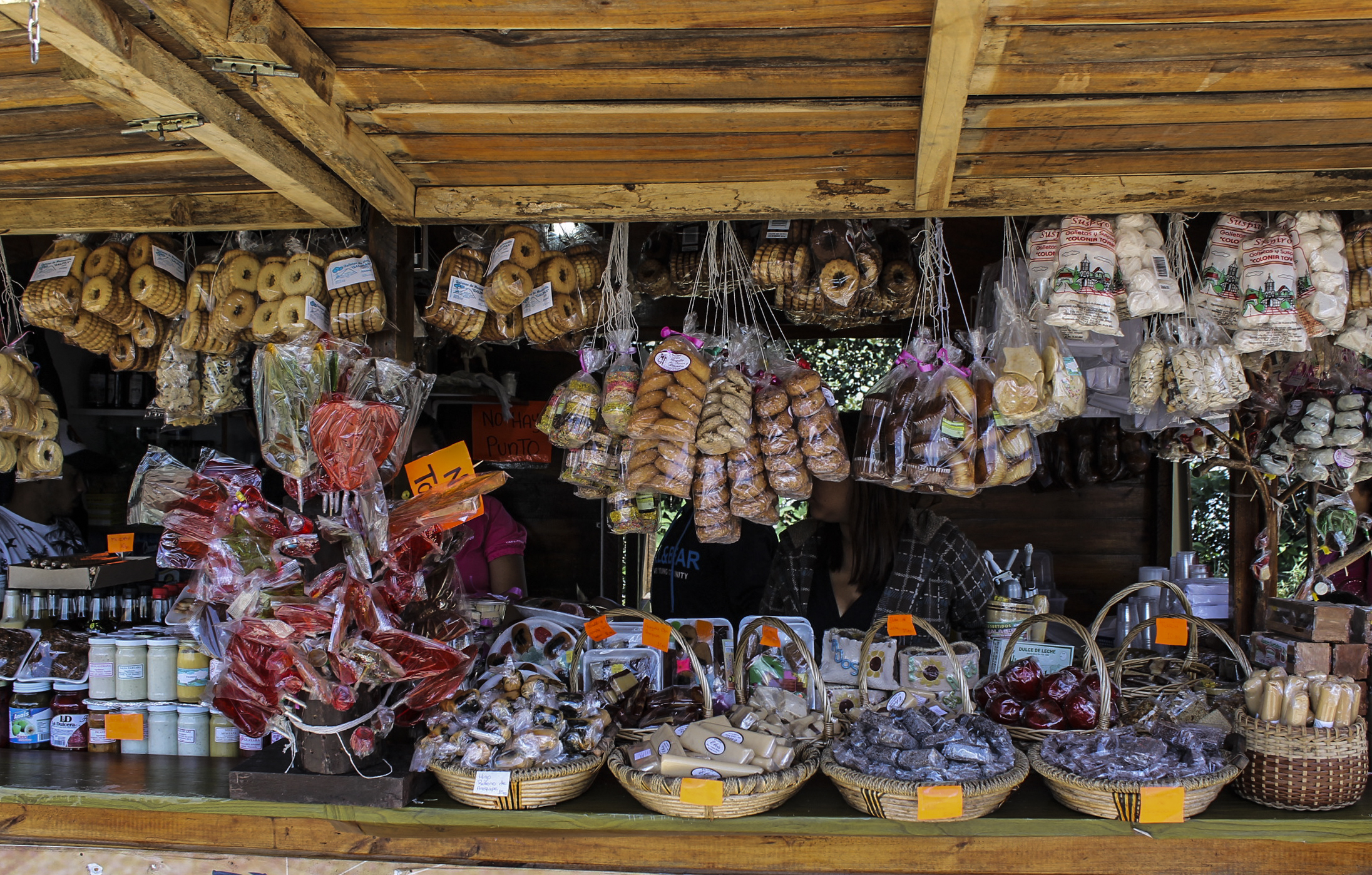 Dulces Tradicionales